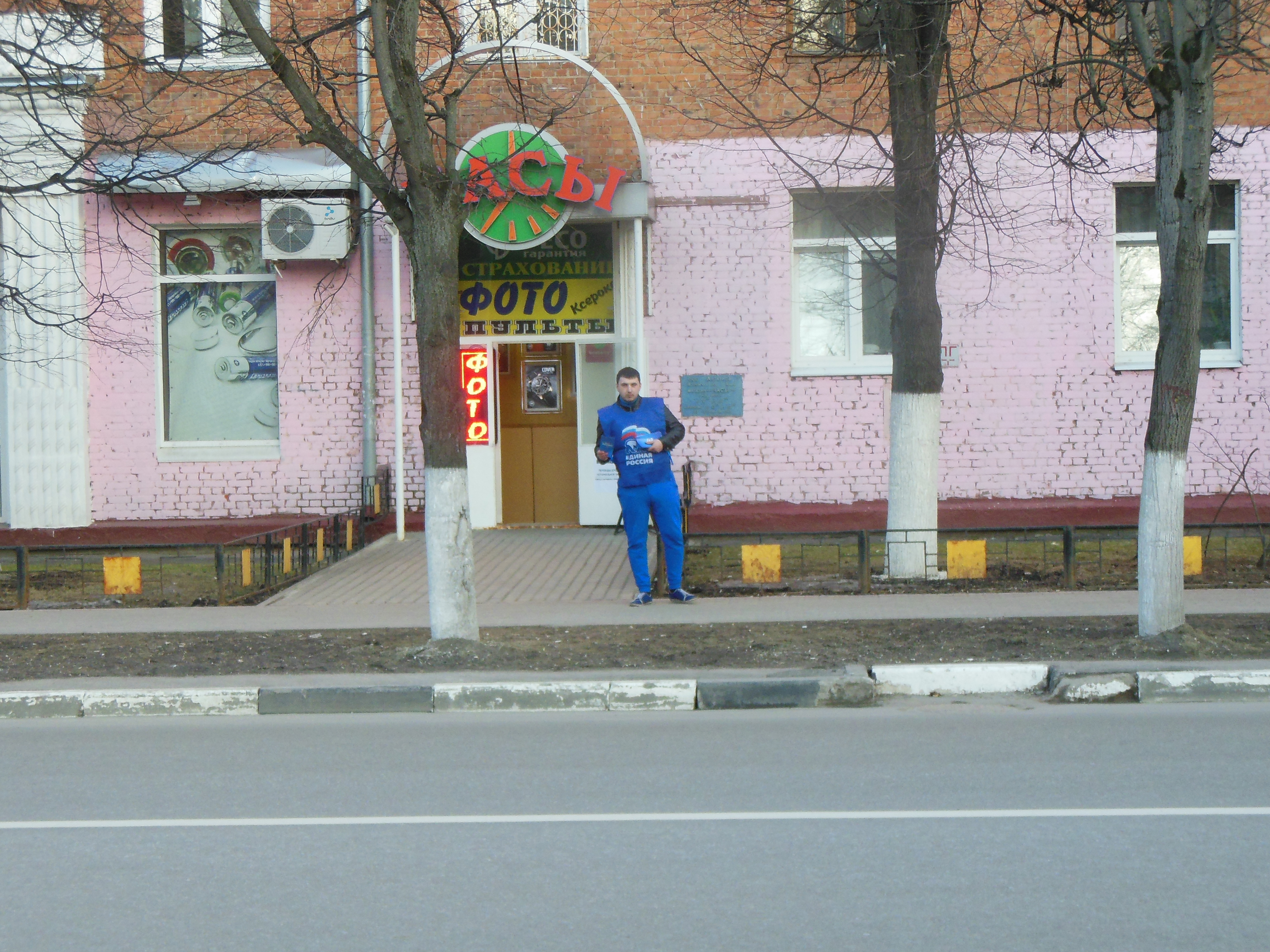 Агитатор от партии «Единая Россия» раздает листовки на улице г. Химки.